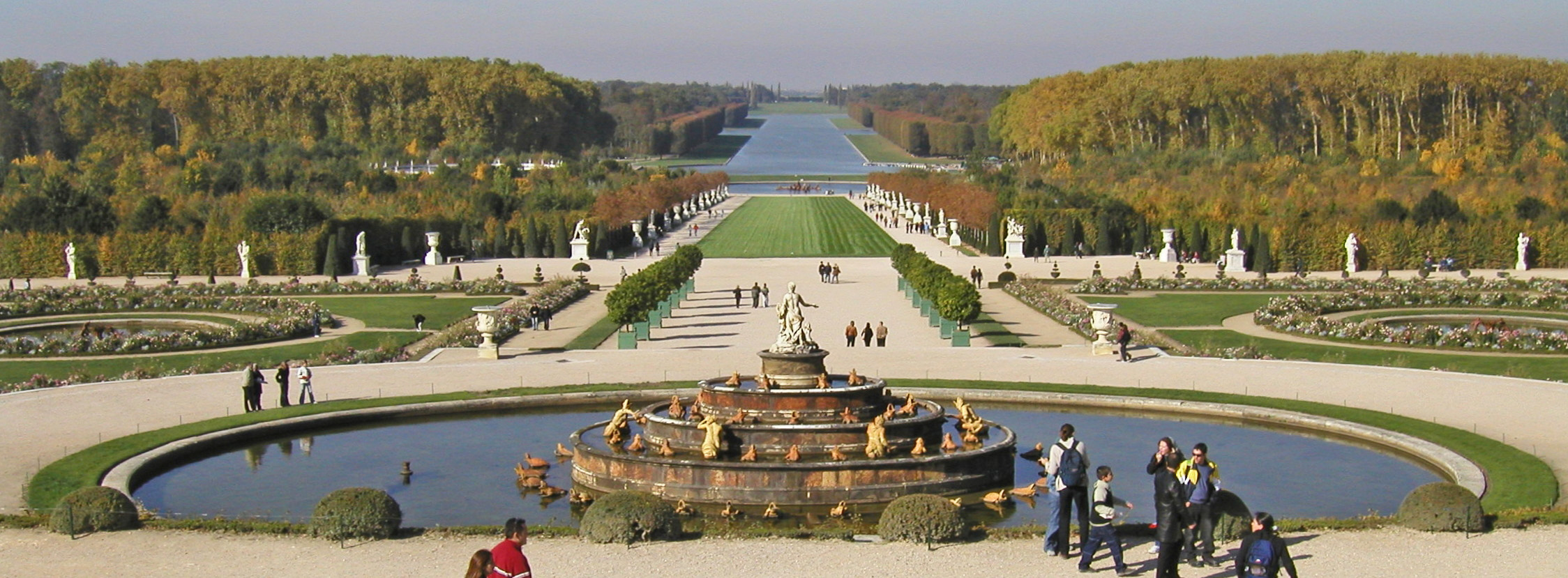 Jardins du château de Versailles, Bassin de Latone